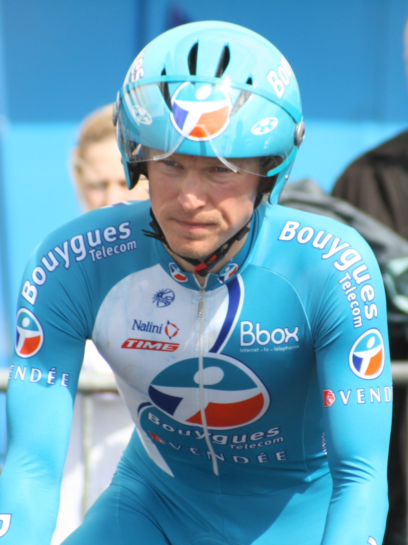 Yuri Trofimov, durant les Quatre jours de Dunkerque 2009, à Douai